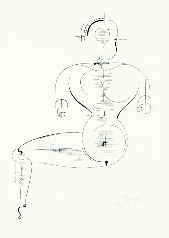 Figur H 2 (Figur von der Seite), Lithografie, 1922